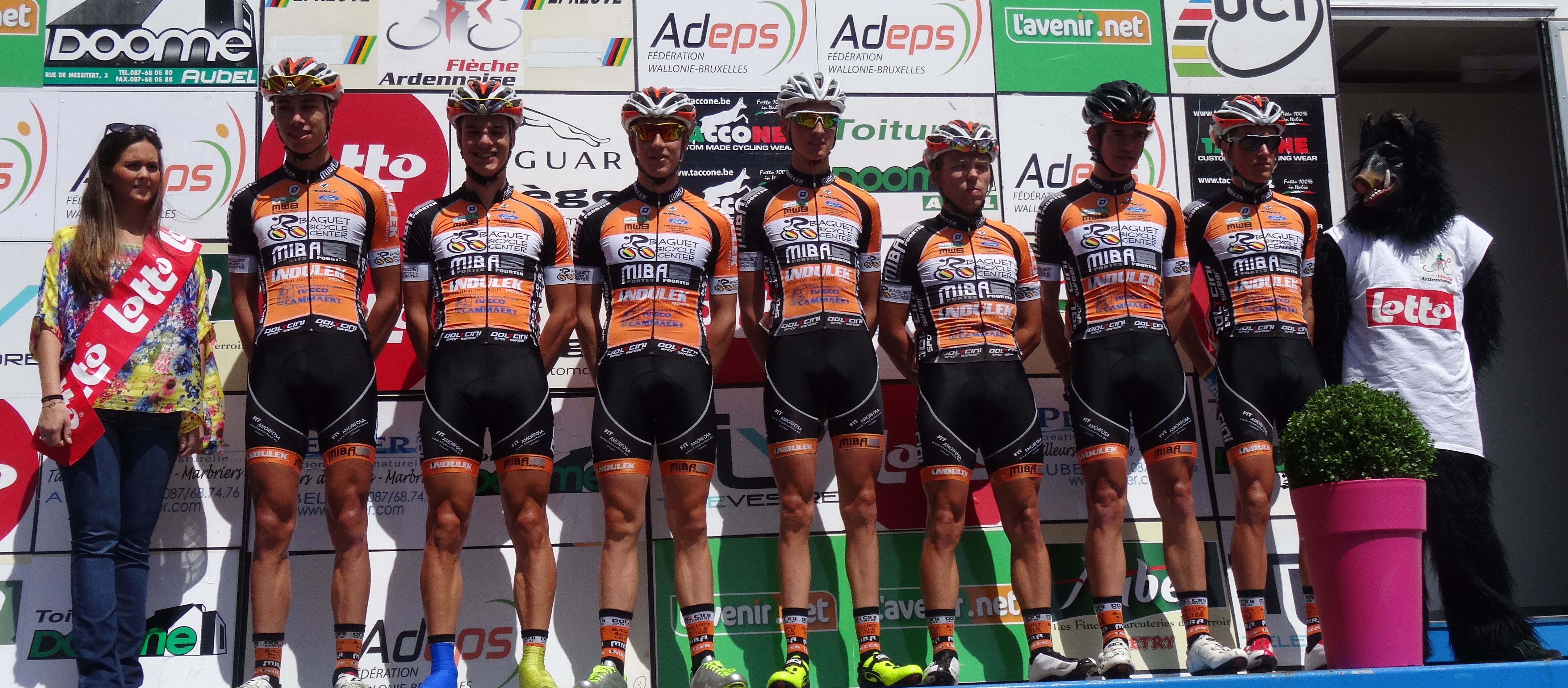 Reportage photographique réalisé le dimanche 22 juin à l'occasion du départ et de l'arrivée de la Flèche ardennaise 2014 à Herve, Belgique.